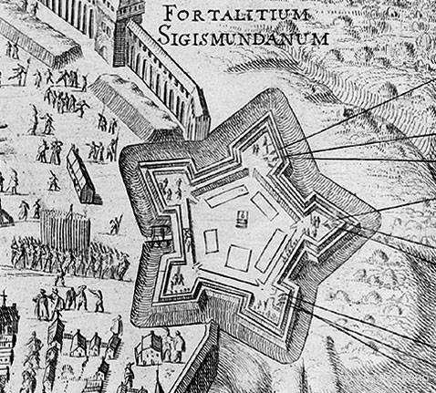 Королевский бастион на гравюре Вильяма Гондиуса "План осады и обороны крепости Смоленска в 1632 – 1634 гг."